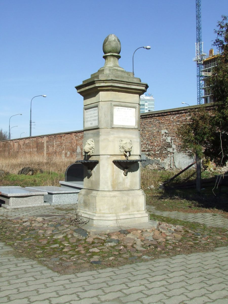 Wodotrysk